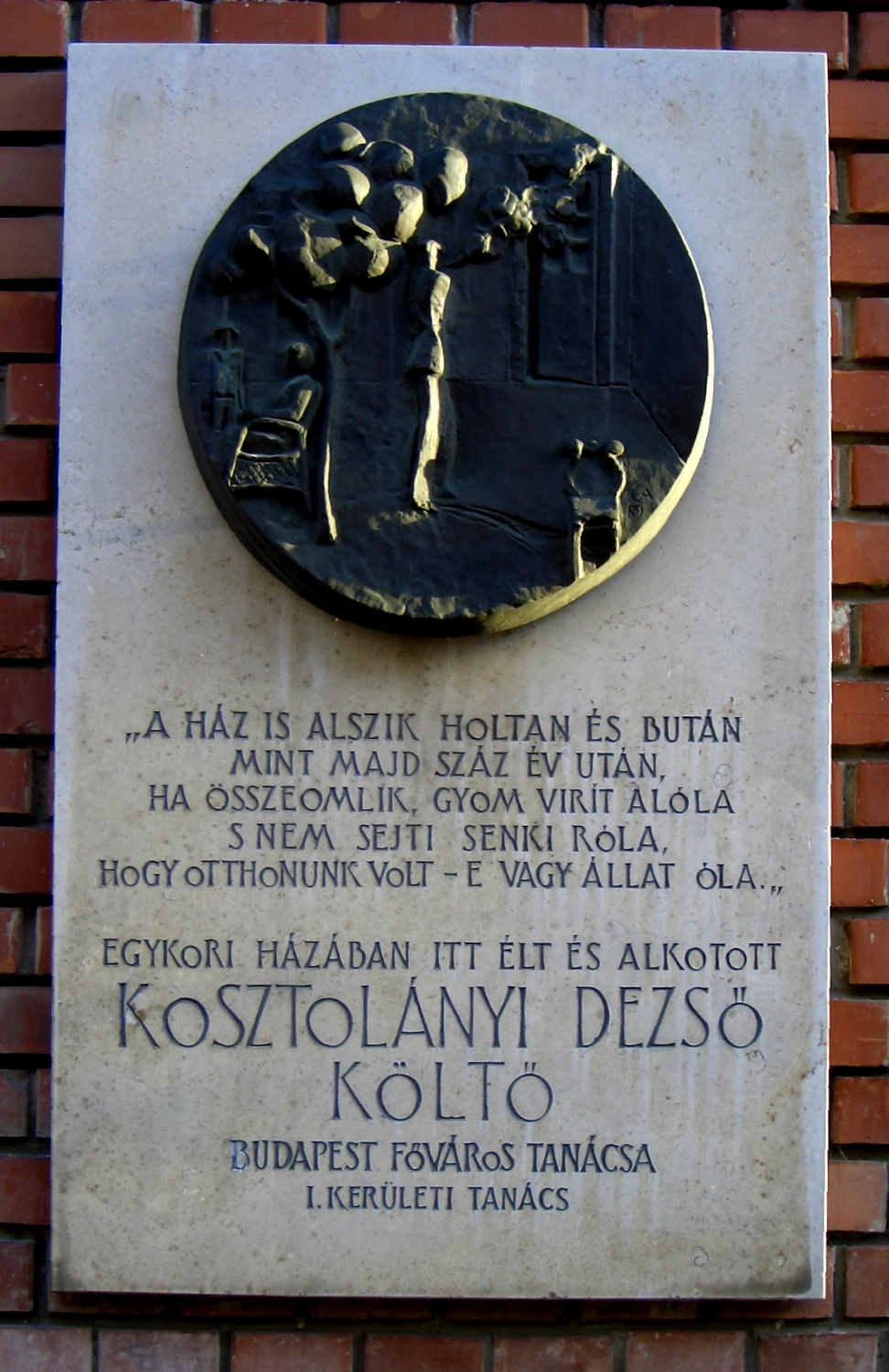 Emléktábla Kosztolanyi Dezső lakóházán (Czinder Antal, 1989), Budapest I. kerülete, Várnegyed, Tábor utca 12. Czinder Antal alkotása.